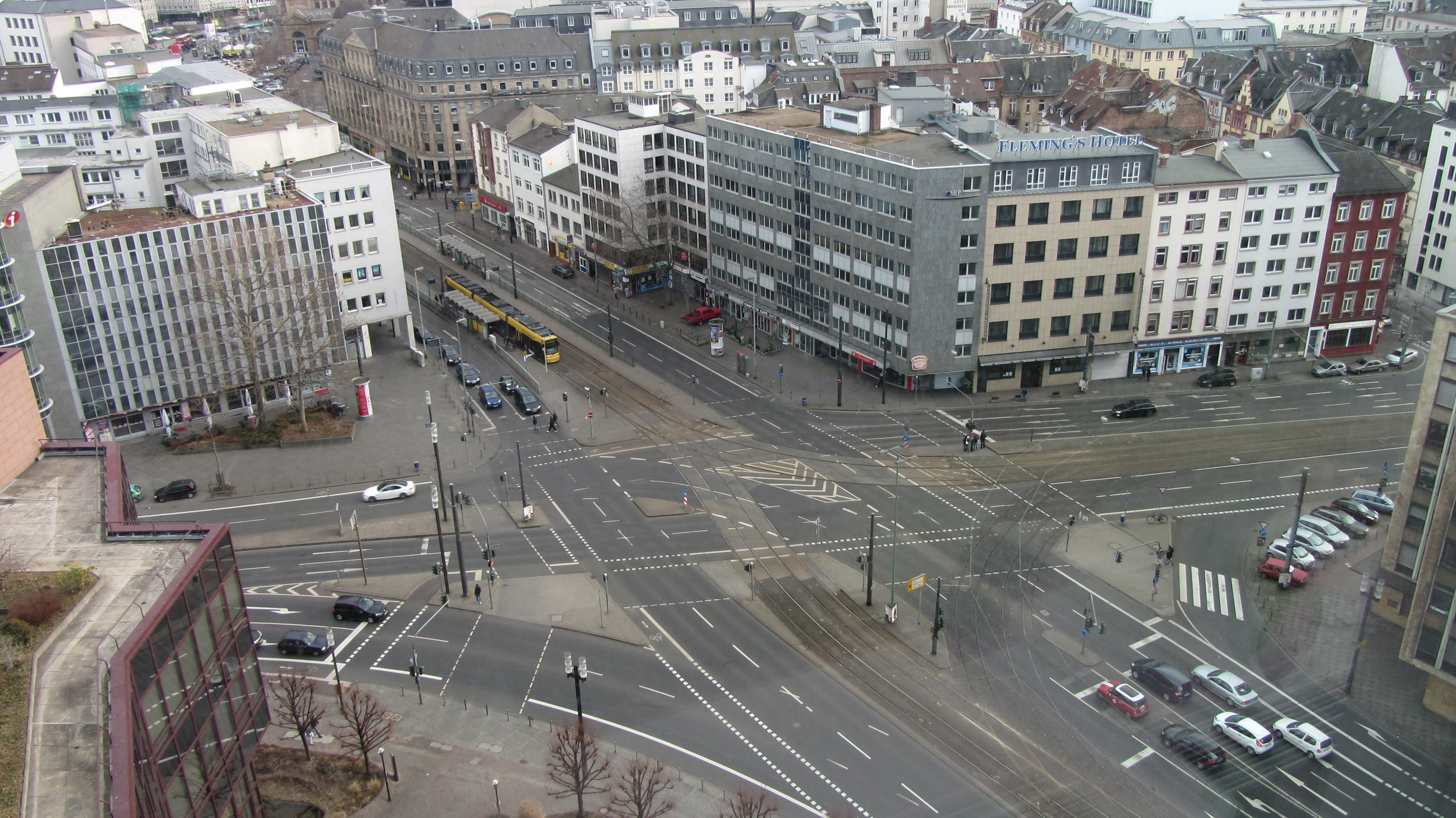 Platz der Republik, Frankfurt am Main